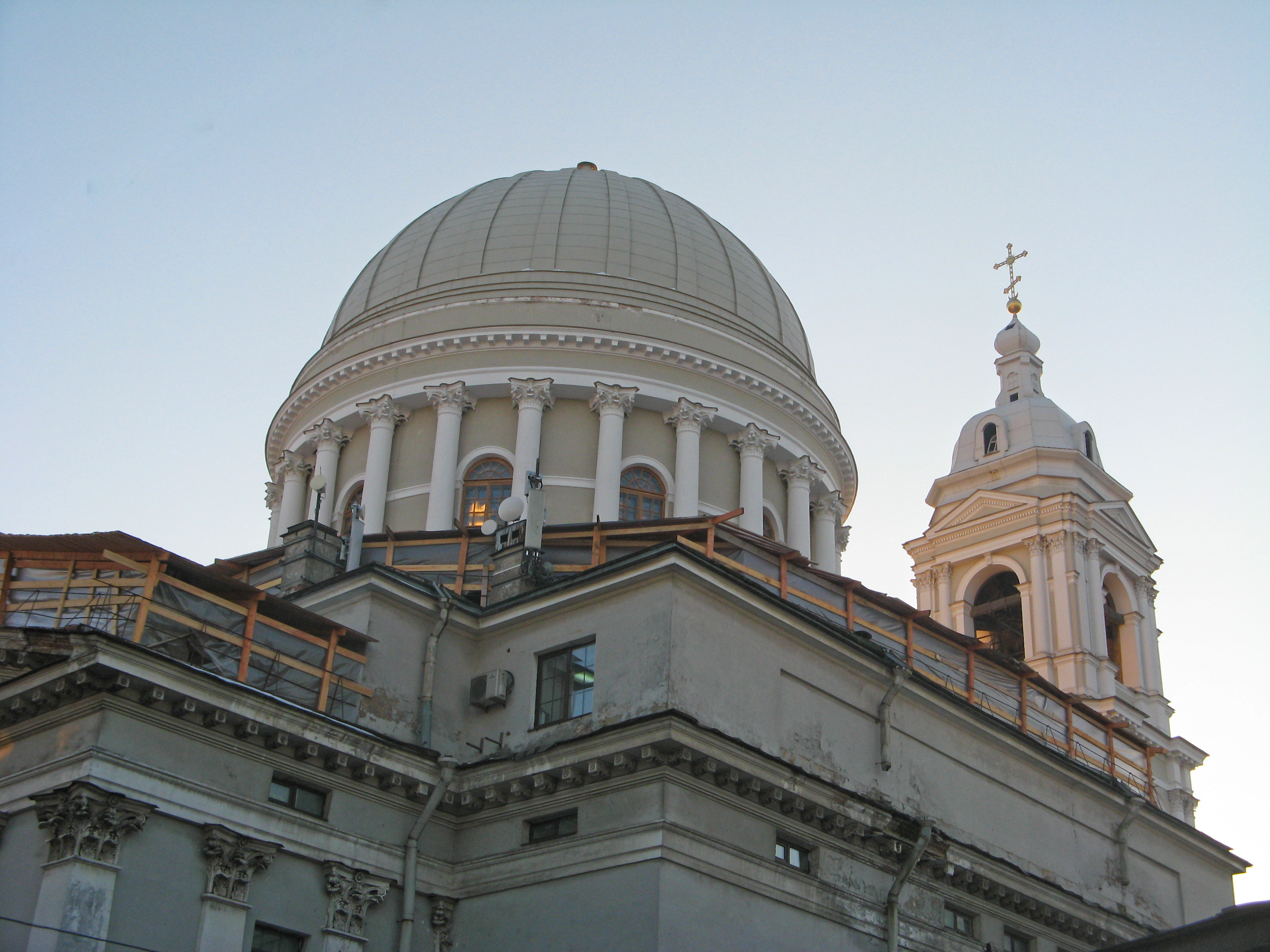 Церковь Святой Великомученицы Екатерины: Кадетская линия, 27А, Тучков переулок, между домами 22 и 24, Василеостровский район, Санкт-Петербург